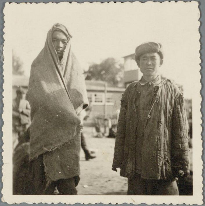 Russische krijgsgevangenen in Kamp Amersfoort. Fotonummer 14960. archief Eemland